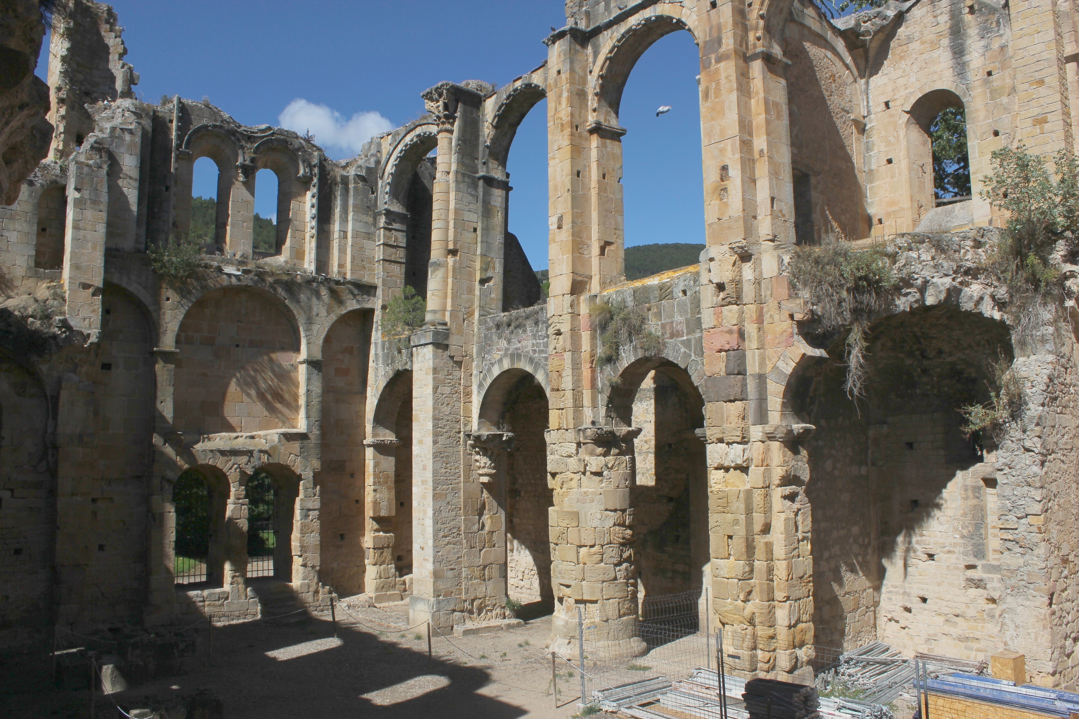 Abbaye d'Alet les bains - (11)France